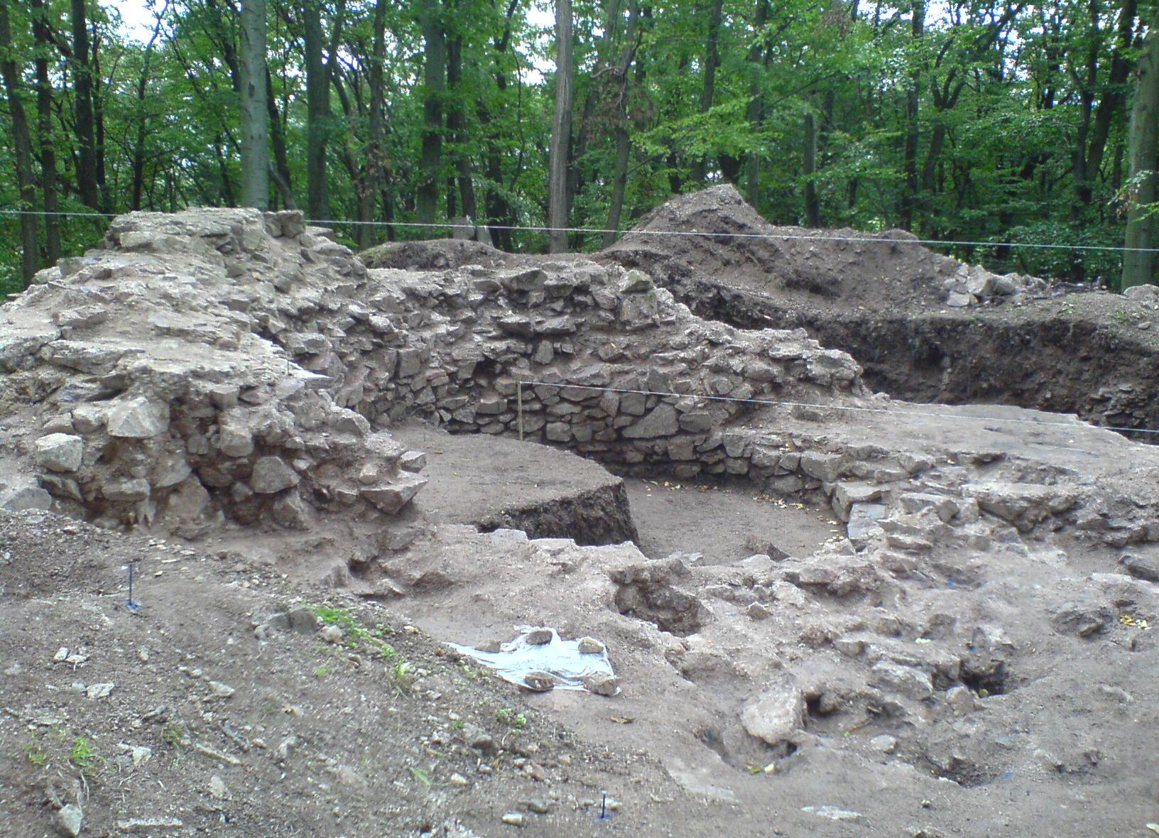 Hrádok, Obišovce. Obnova zvyškov obišovského hradu na kopci Zámčisko. Doba vzniku 1289-1297, stredovek.